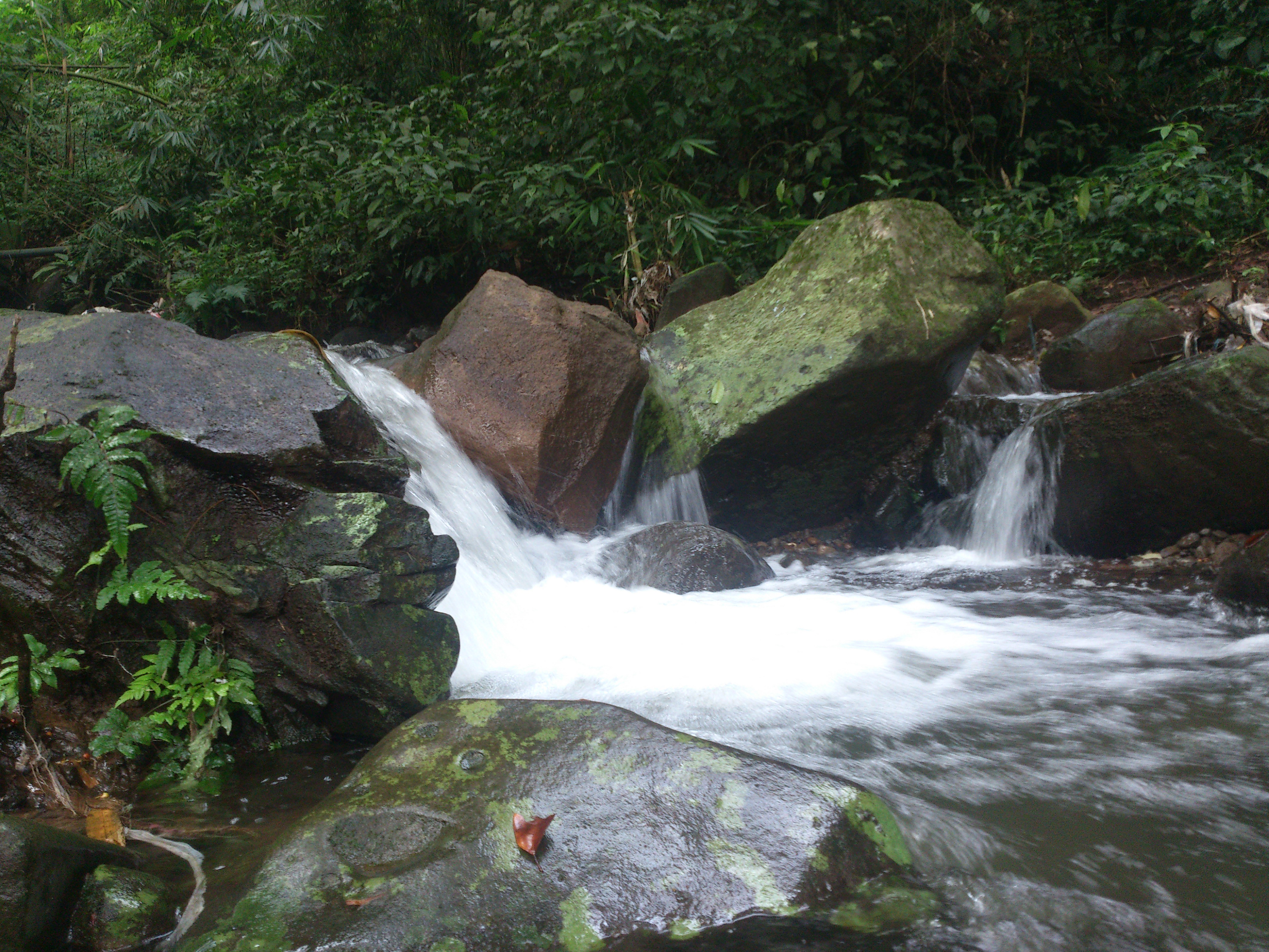 air terjun curah watu berada di desa nogosari dan satu tempat dengan air terjun watu gedheg